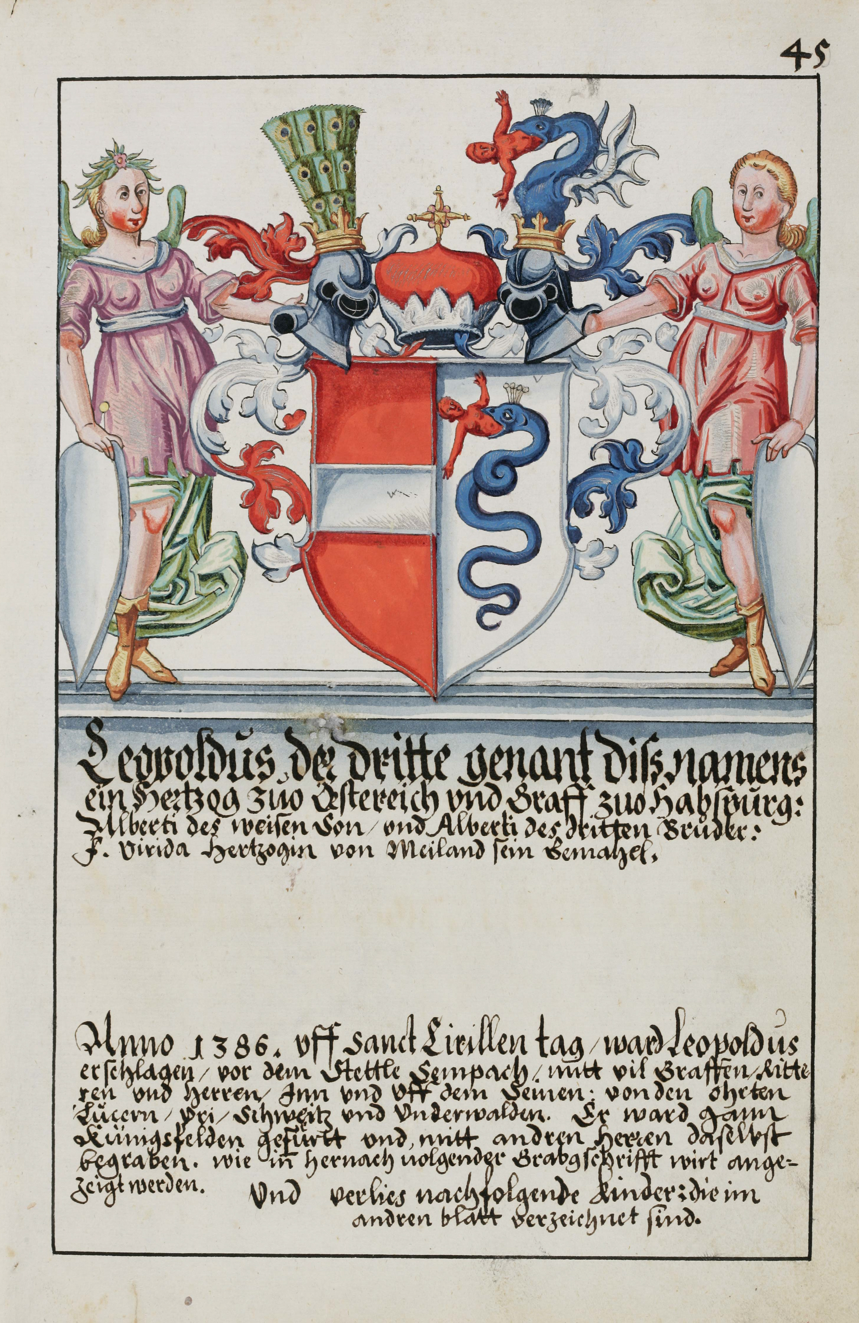 Wappenbuch des Hans Ulrich Fisch. Papier, 31.5 x 19.5 cm, Aarau 1627. Aarau, Staatsarchiv Aargau, V/4-1985/0001, fol. 45r